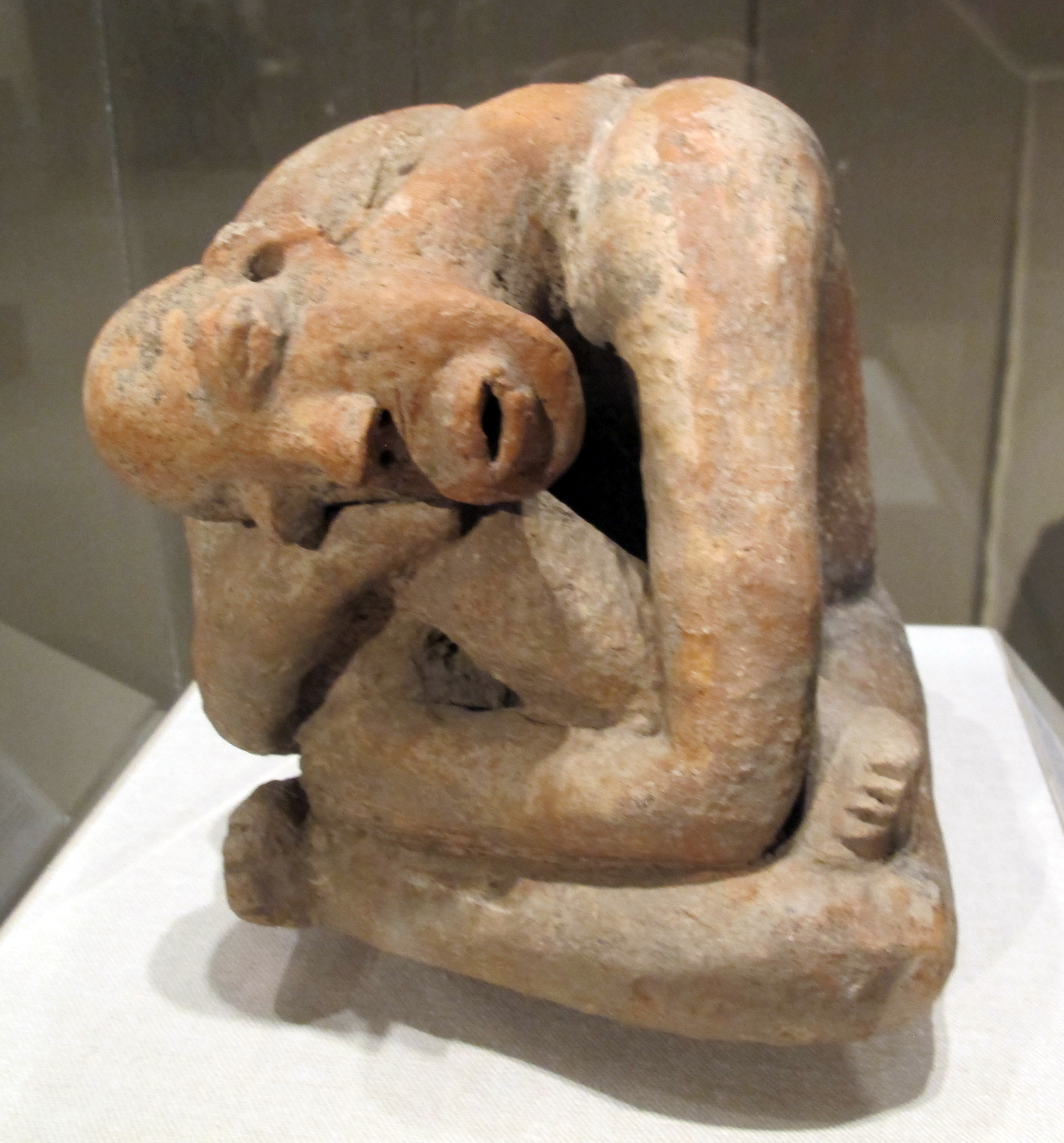 Collezione del Metropolitan Museum, NYC